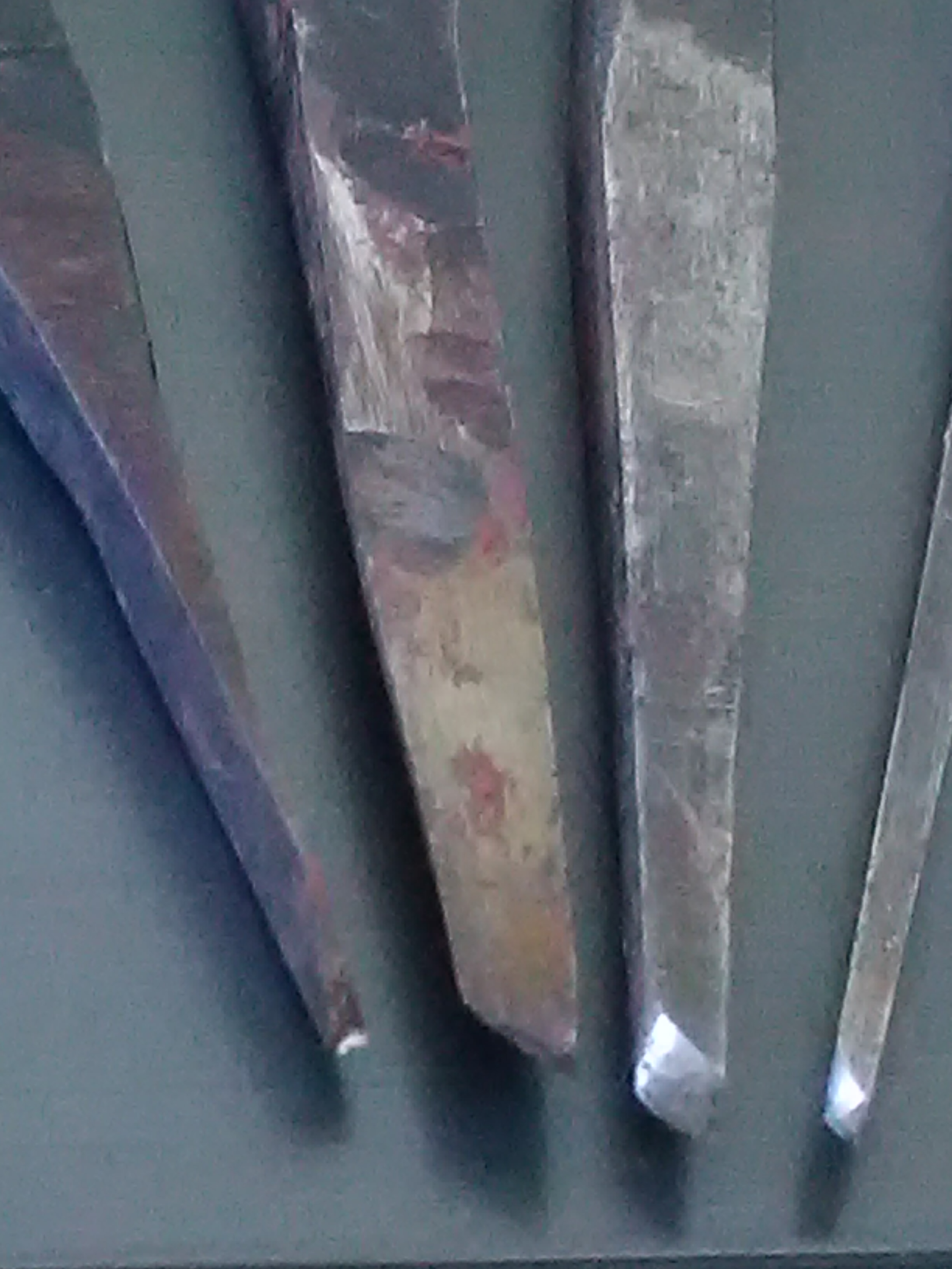 Armando Gorosabel Amuategi grabatzaile eibartarraren labainak eta gubilak. Punten eta aroaren detailea.